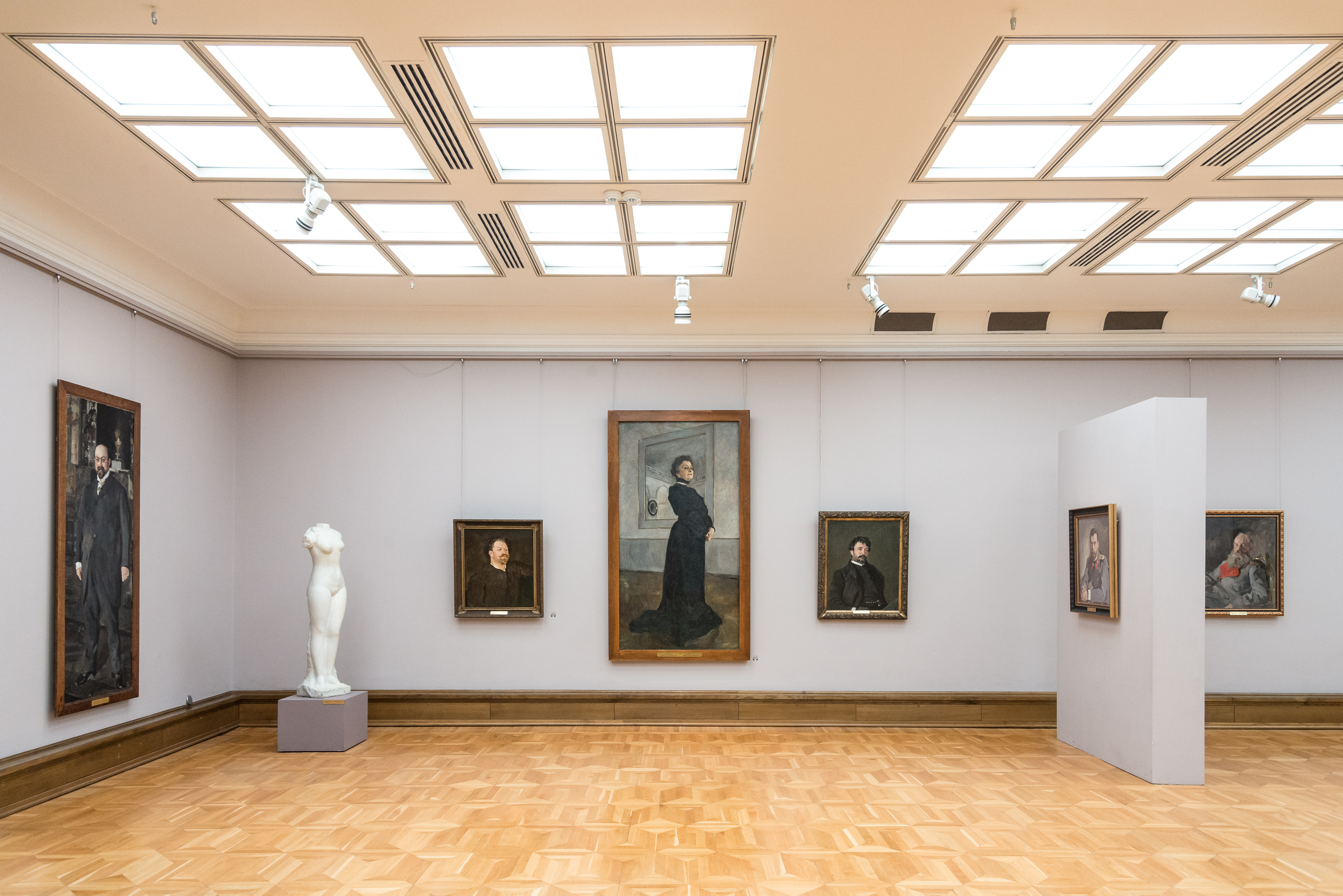 Портрет М. Н. Ермоловой в Третьяковской галерее